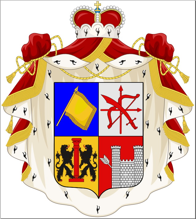 герб князей Бараташвили